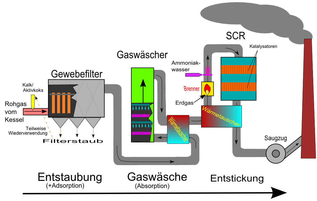 Beispiel einer Rauchgasreinigungsanlage eines Müllverbrennungskessels. Bitte beachten: Es gibt viele Zusammenstellungen von Rauchgasreinigungen, dies ist nur eine von vielen Konstellationen